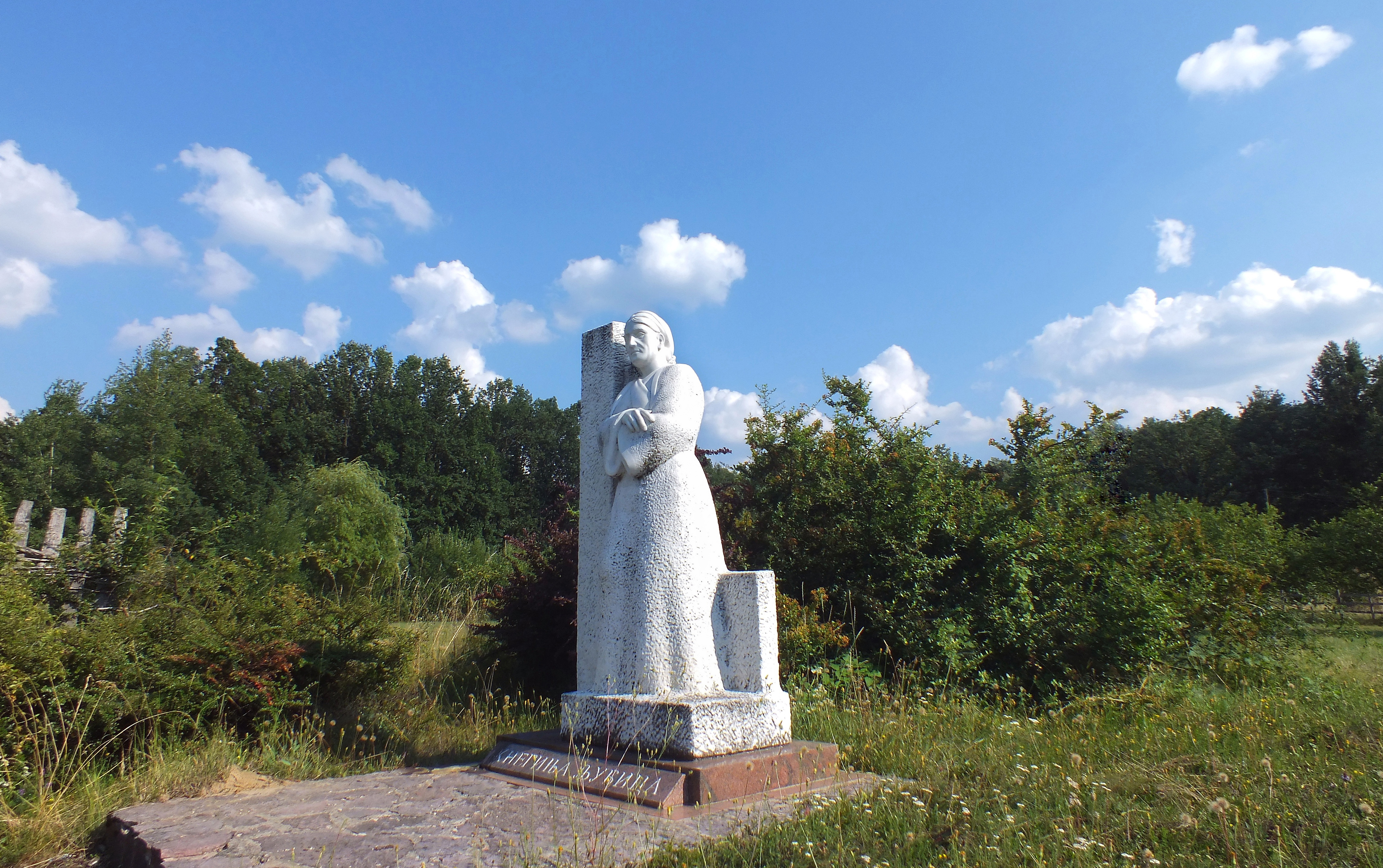 Кнегиња Љубица Обреновић,девојачко Вукомановић,супруга Кнеза Милоша Обреновића,рођена је 14.Јануара 1785.године у Срезојевцима,Општина Горњи Милановац,Србија...